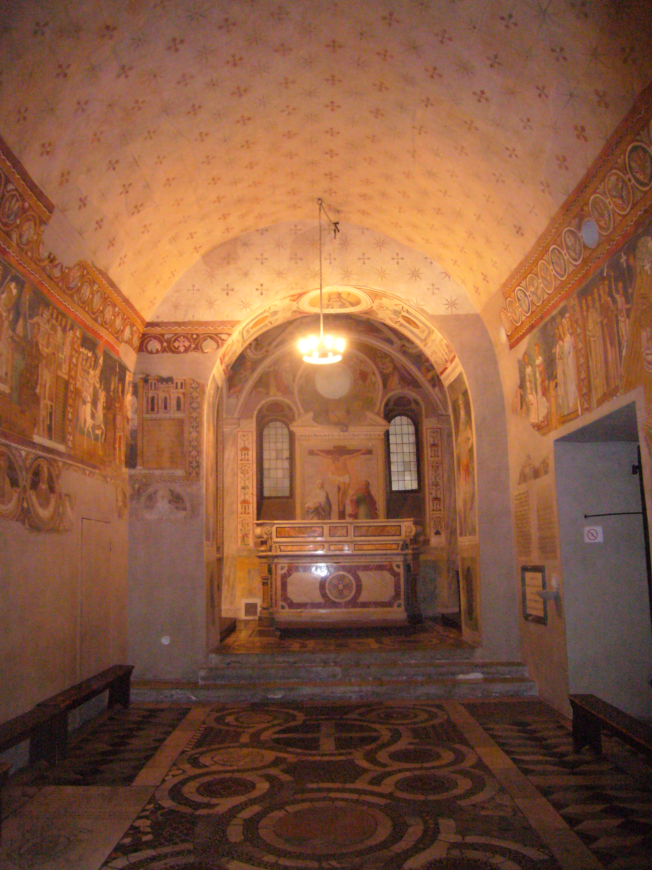 Roma, Santi Quattro Coronati: oratorio di S. Silvestro